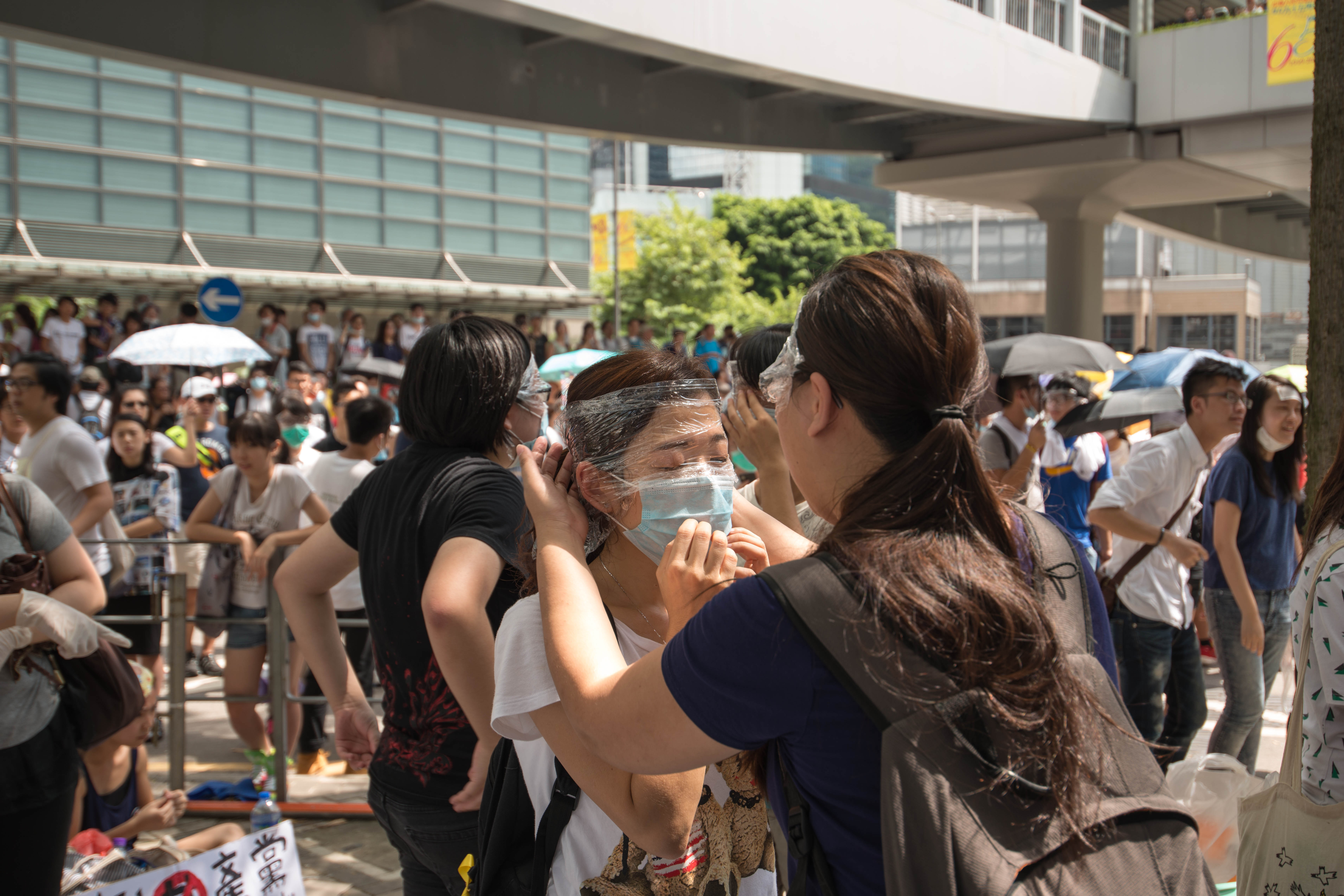 hong kong demands democracy 2014.09.27 2014.09.27 添美道